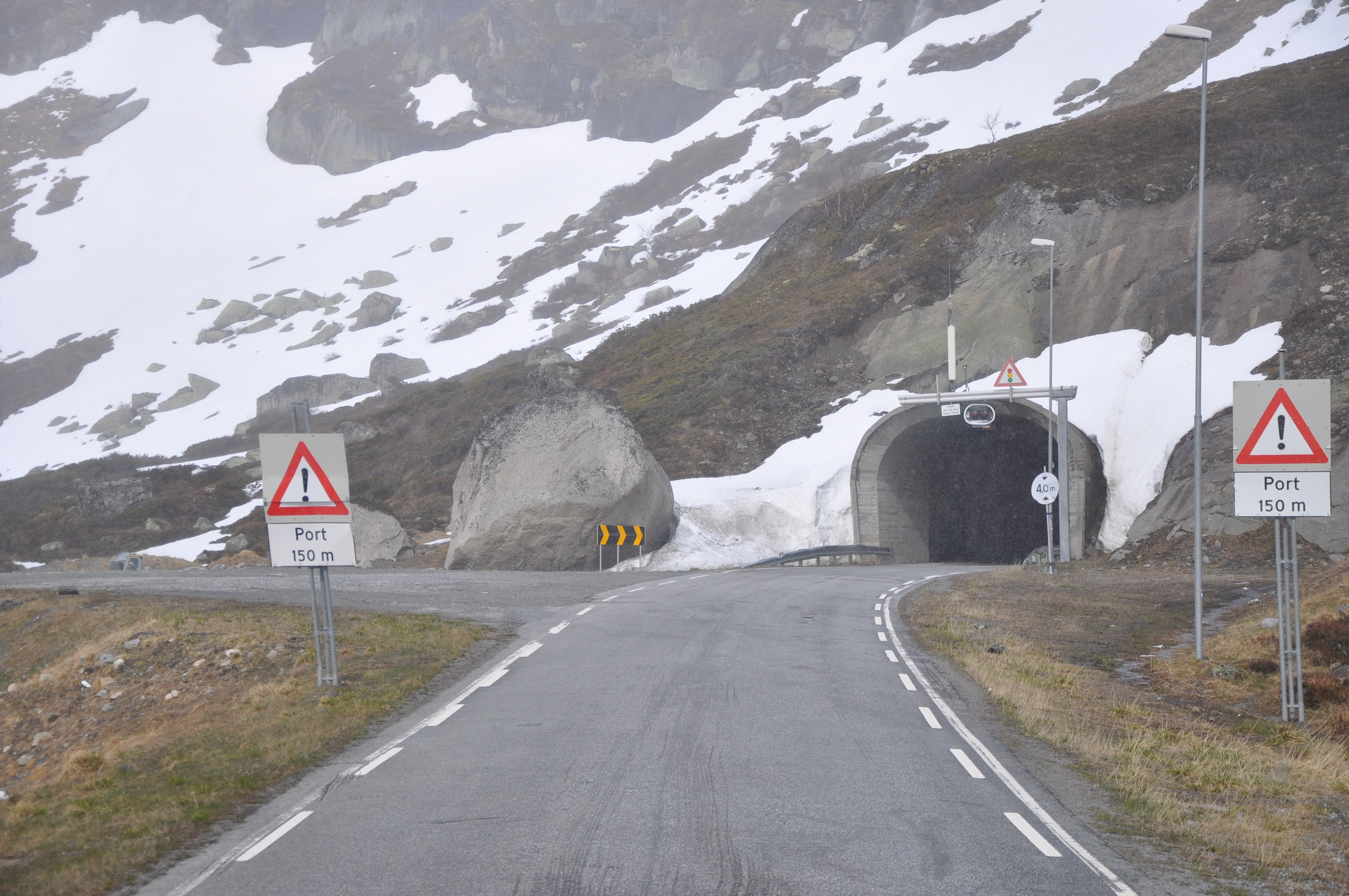 Austre innkøyring til Geitryggtunnelen på Riksveg 50 i Hol kommune